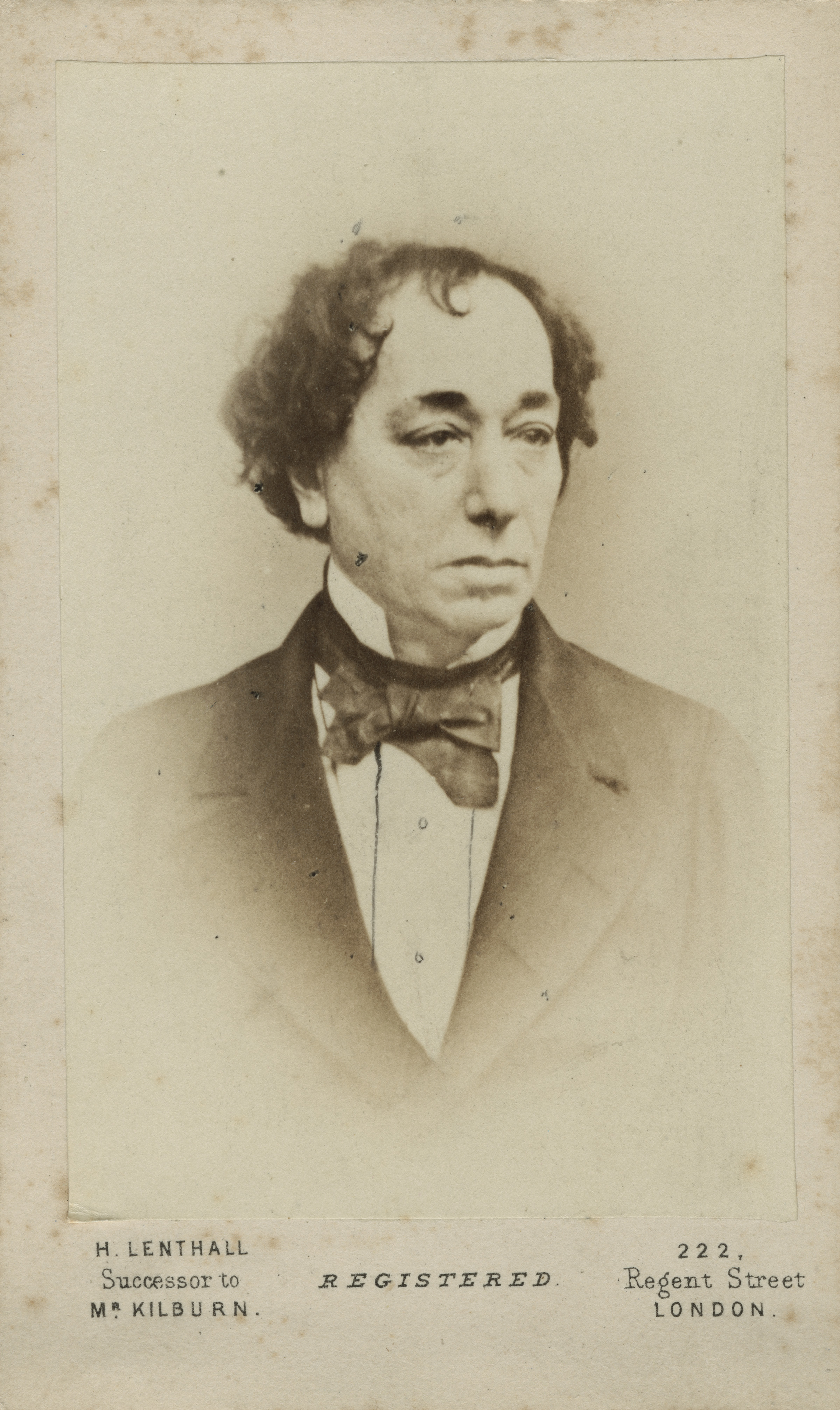 Portrait of Benjamin Disraeli (1804–1881)